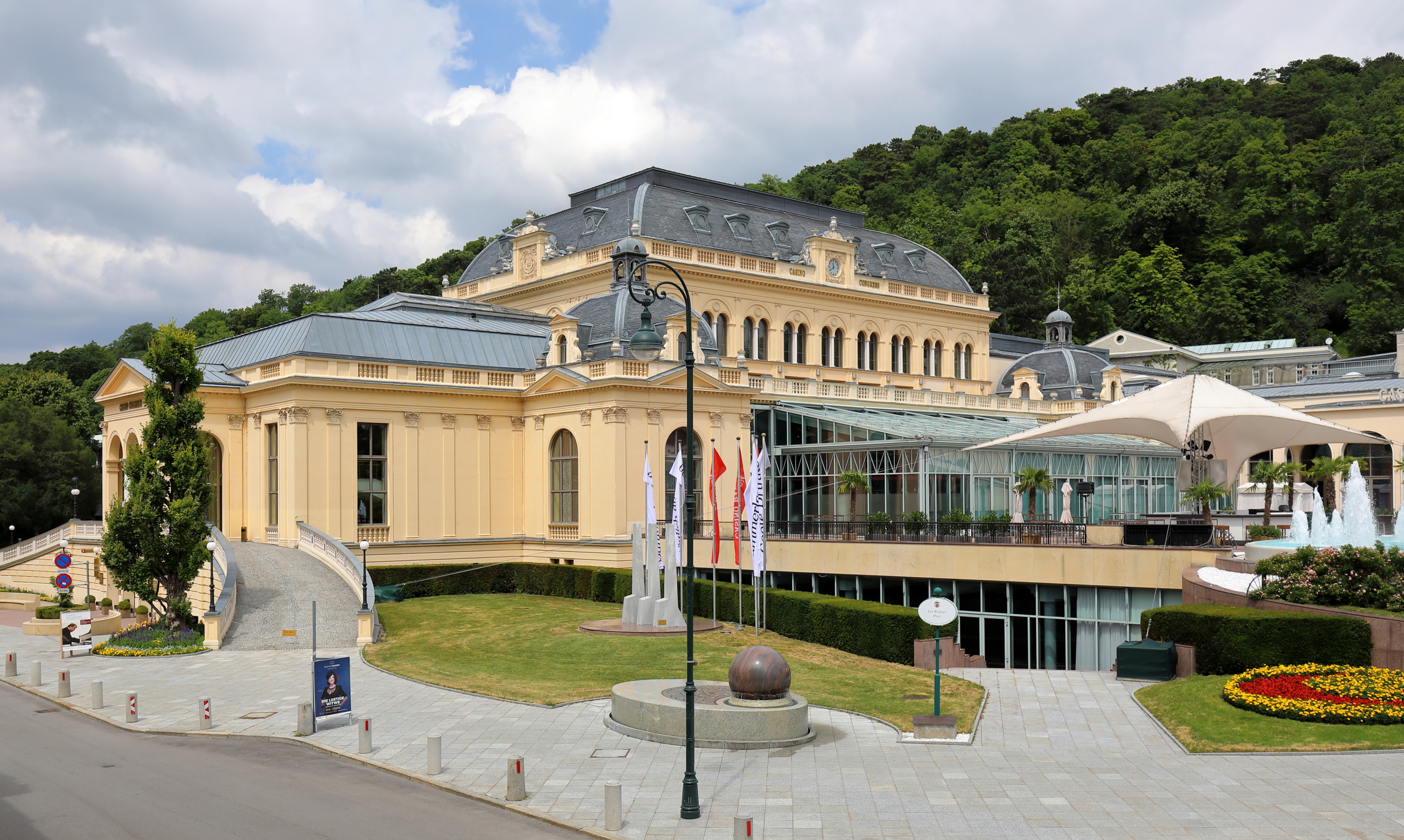 Das ehemalige Kurhaus und jetzige Casino sowie Kongress- und Veranstaltungszentrum an der Adresse Kaiser-Franz-Ring 1 in der niederösterreichischen Stadt Baden.Das Bauwerk im Stil der Neorenaissance wurde ab 1884 nach Plänen der Architekten Eugen Fassbender und Maximilian Katscher (1858–1917) errichtet und am 10. Juni 1886 feierlich als neues Kurhaus eröffnet. Am 12. April 1934 wurde im Kurhaus das Badener Casino als erster Ganzjahresbetrieb Österreichs der damaligen Österreichischen Casino A. G. eröffnet. Nach einem großen Umbau ab 1992 fand im März 1995 die Eröffnung als größtes Casino Europas samt Kongress- und Veranstaltungszentrum statt.